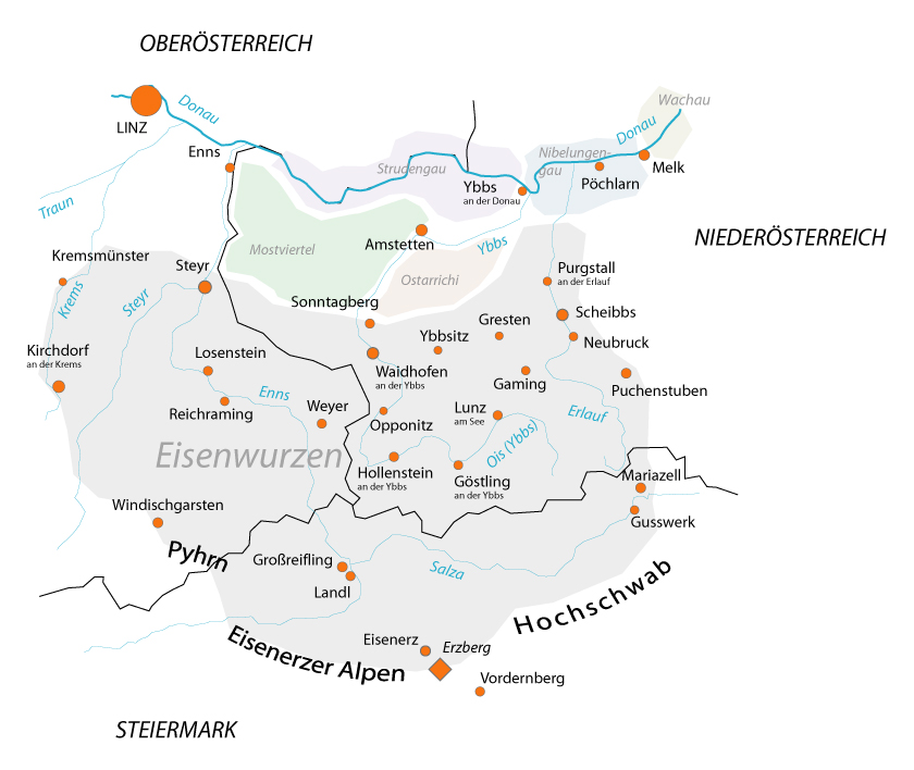 eisenwurzen karte